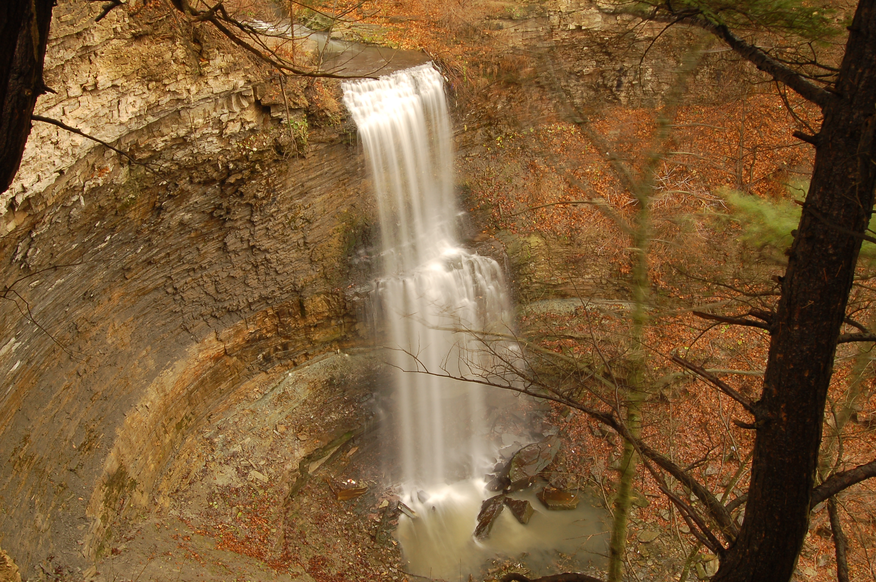 Felker's Falls